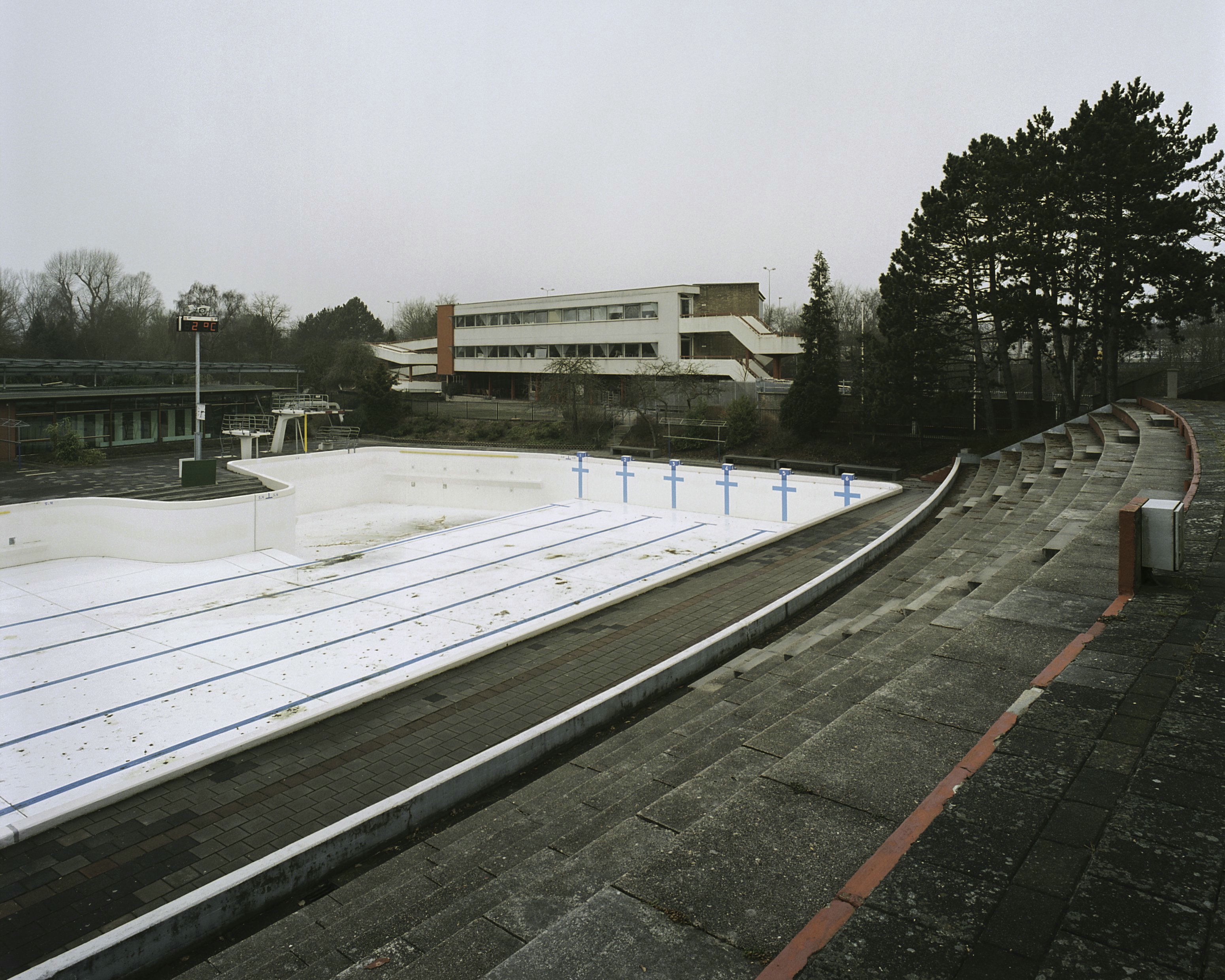 zwembad De Papiermolen: Overzicht van het diepe bad, gezien richting de startblokken. Op de achtergrond het hoofdgebouw